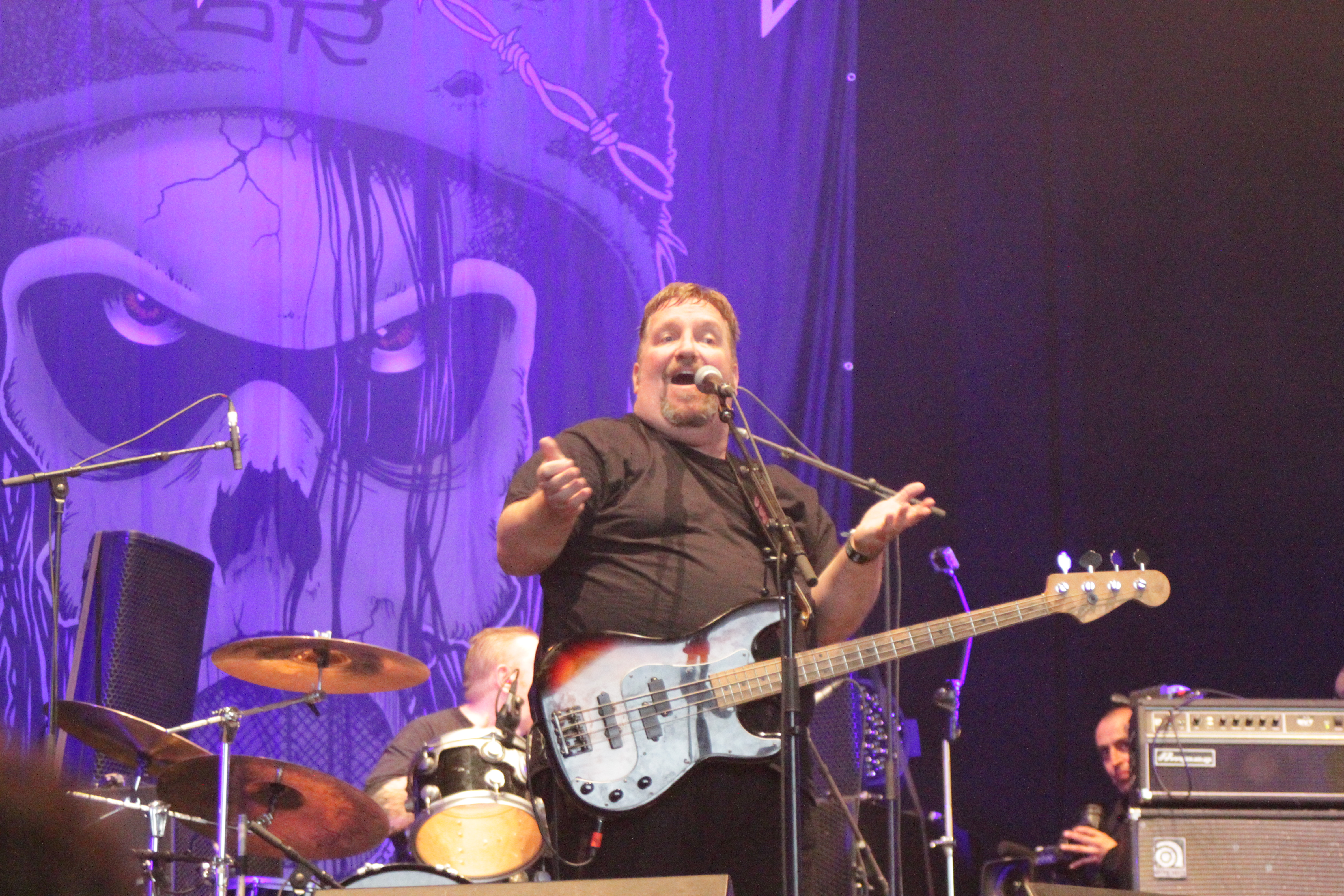 Phil Rind, Sacred Reich, Hellfest 2016.